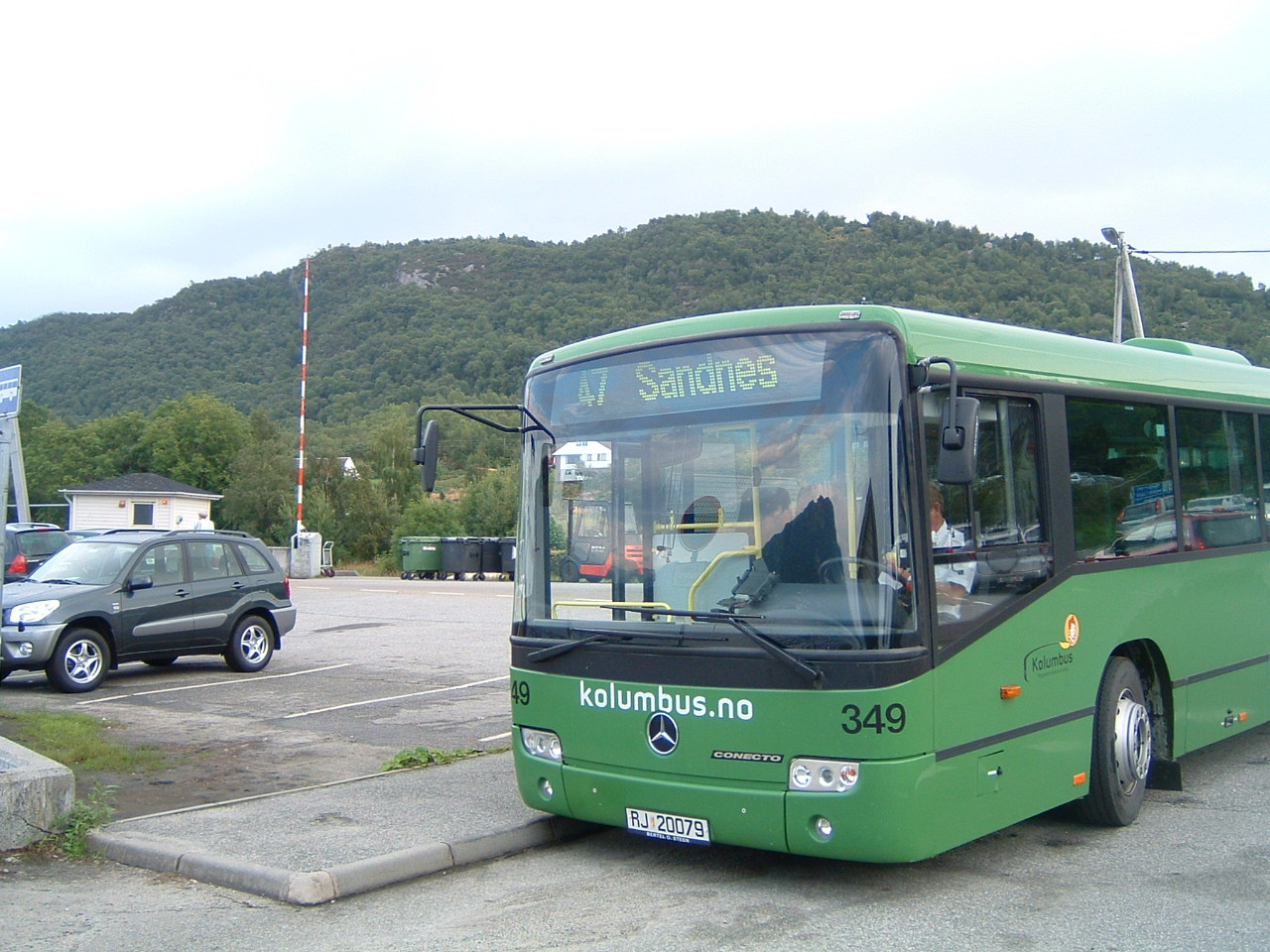 Bilde av en buss som går rute 47 fra Lauvik fra Kolumbus.